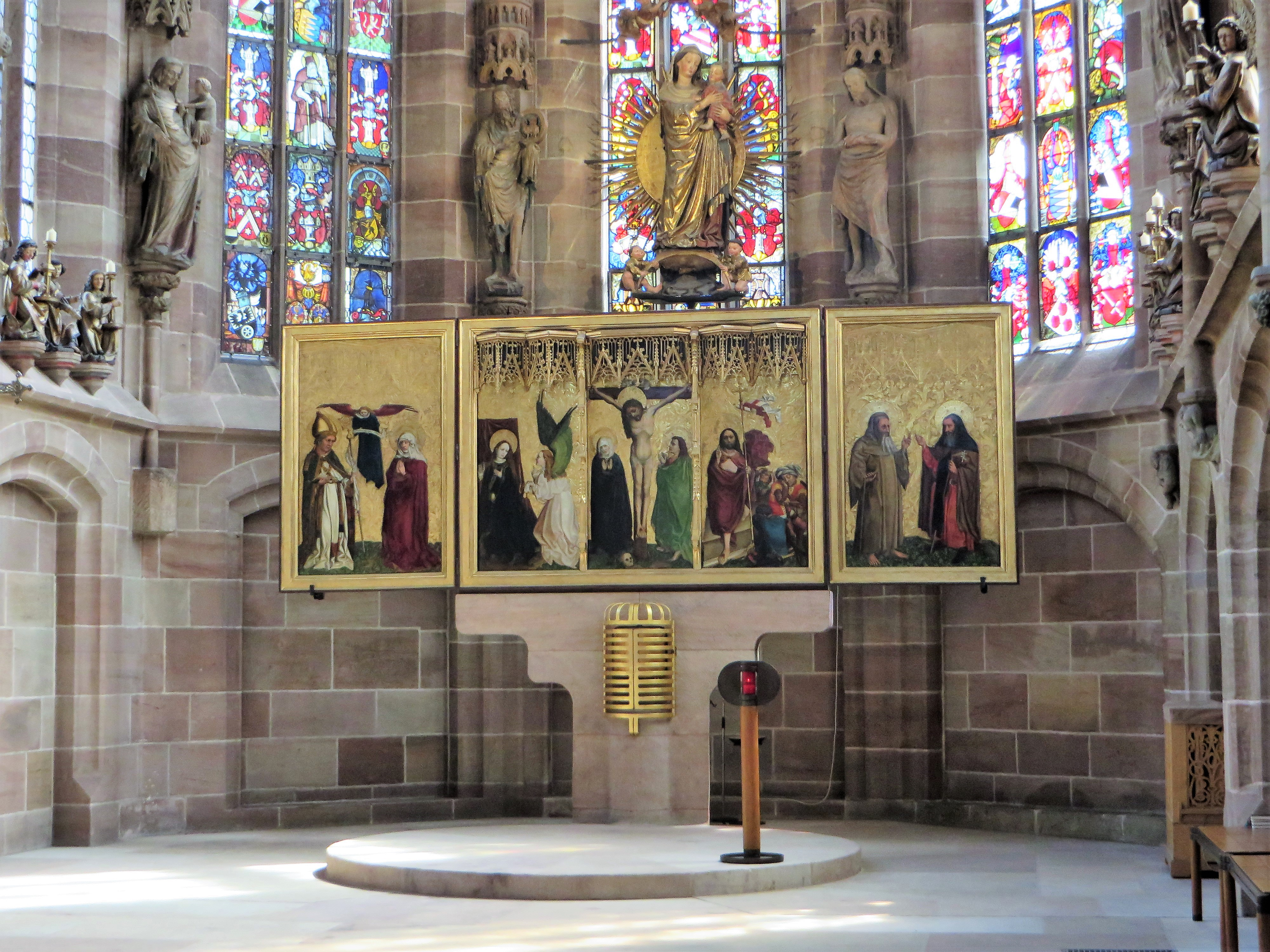 Frauenkirche, heute katholische Stadtpfarrkirche Unserer Lieben Frau, in Nürnberg am Hauptmarkt. Chorraum mit dem Tucheraltar (um 1445). Der Hauptaltar stand bis 1487 als Hochaltar in der Augustinerkirche. Der Tucheraltar gilt als bedeutenstes Werk der Tafelmalerei der Zeit vor Albrecht Dürer.